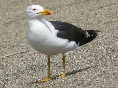 Kleine Mantelmeeuw Larus fuscus intermedius